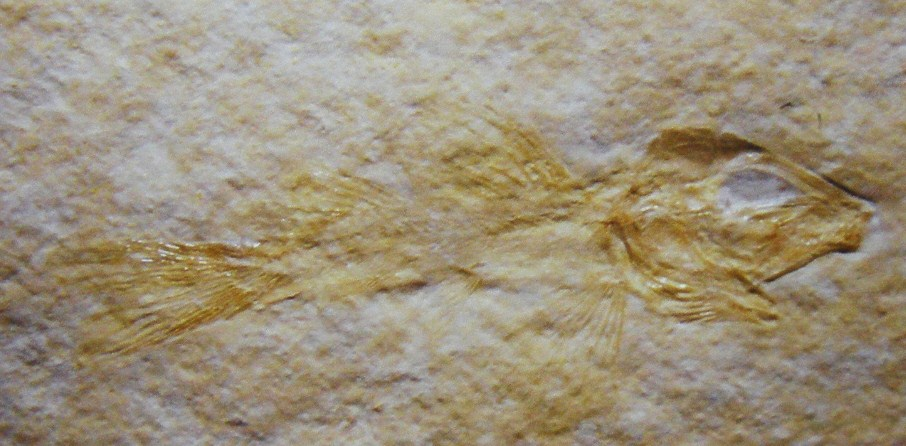 Fossil of Notagogus, an extinct fish- Took the photo at Fossil Show, Munchen 2011